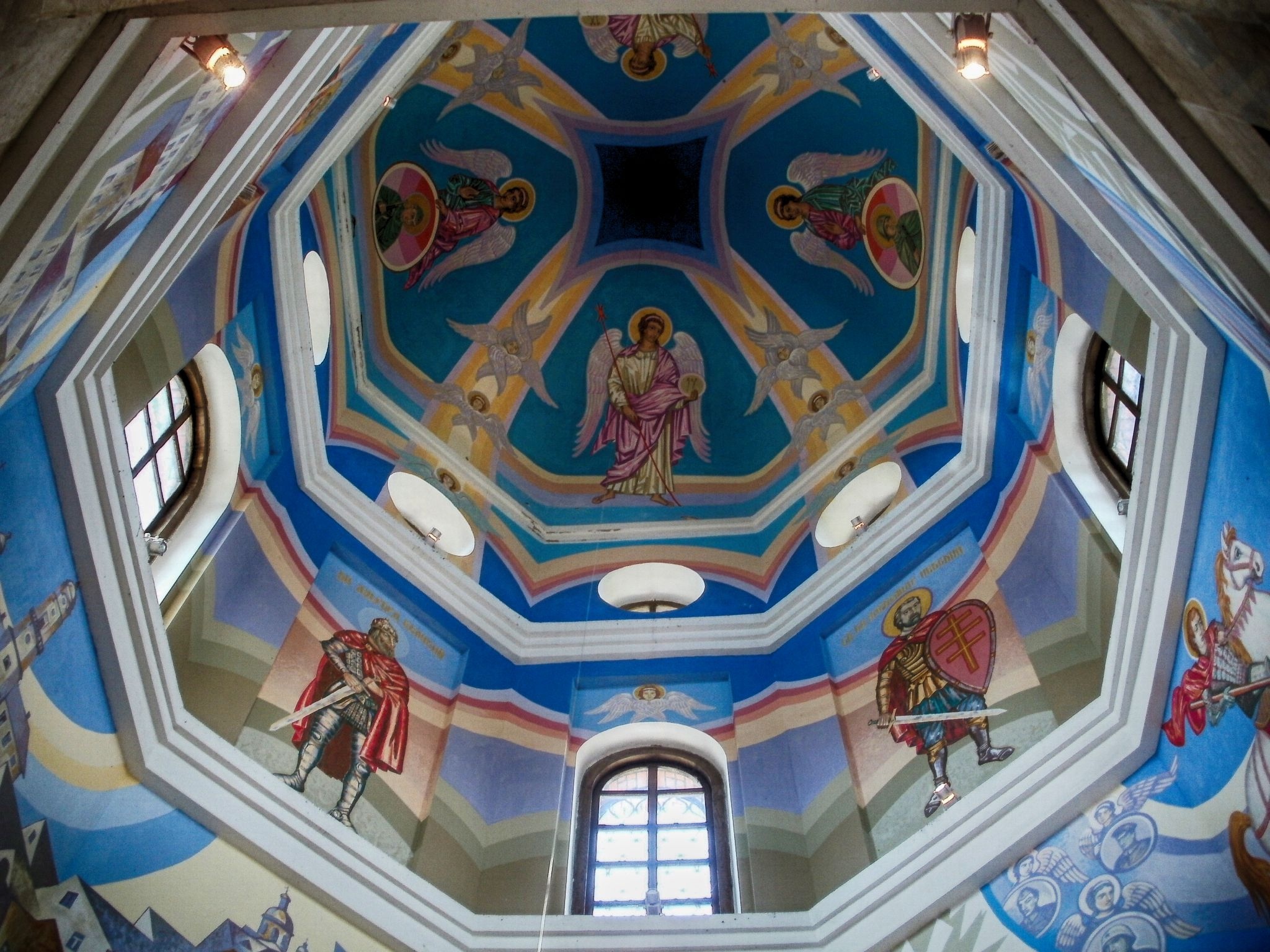 Беларуская (тарашкевіца): Мэмарыяльны комплекс -Буйницкае поле